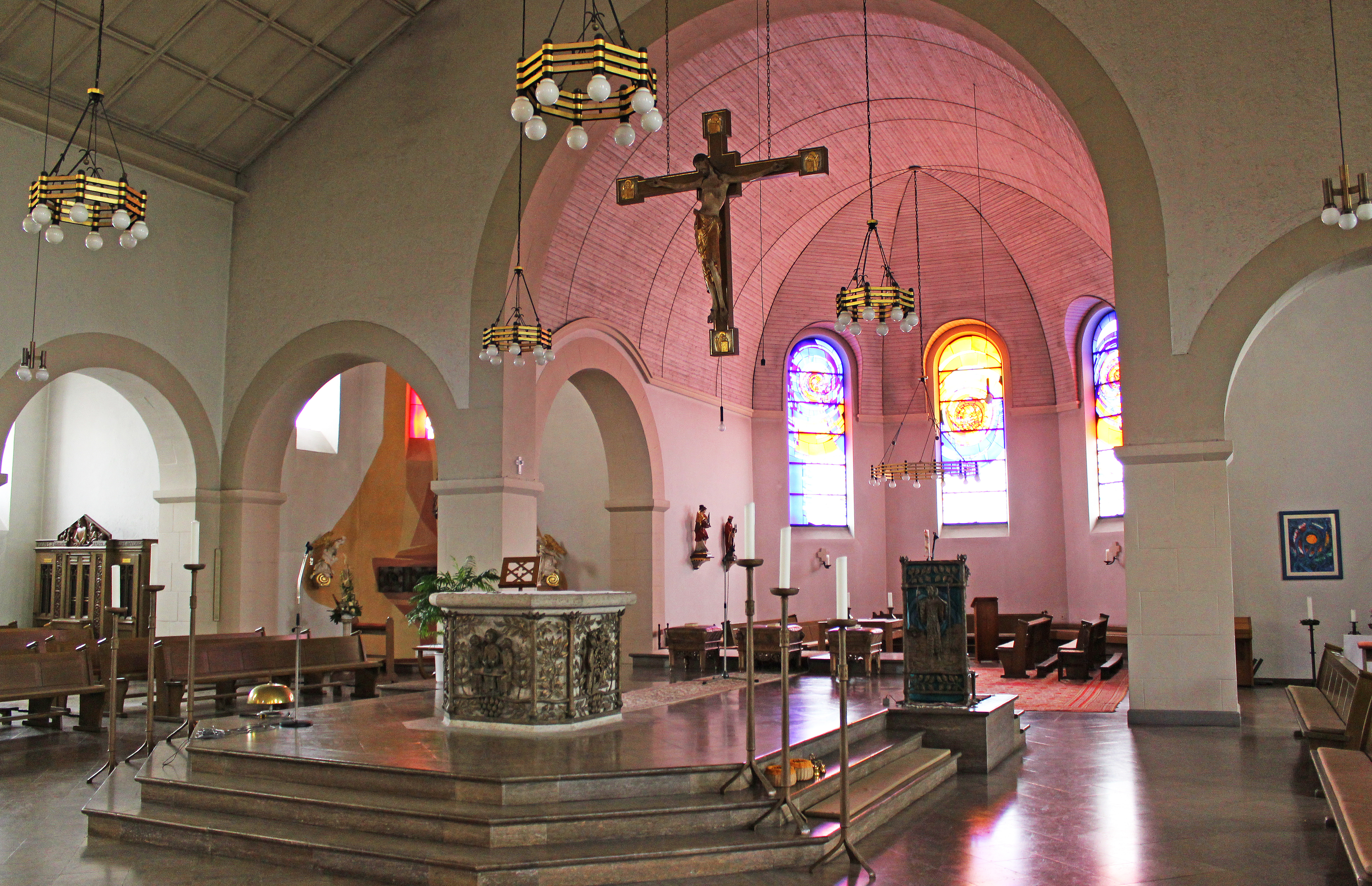 Blick ins Innere der katholischen Pfarrkirche Hl. Dreifaltigkeit in Saarlouis-Fraulautern, Saarland